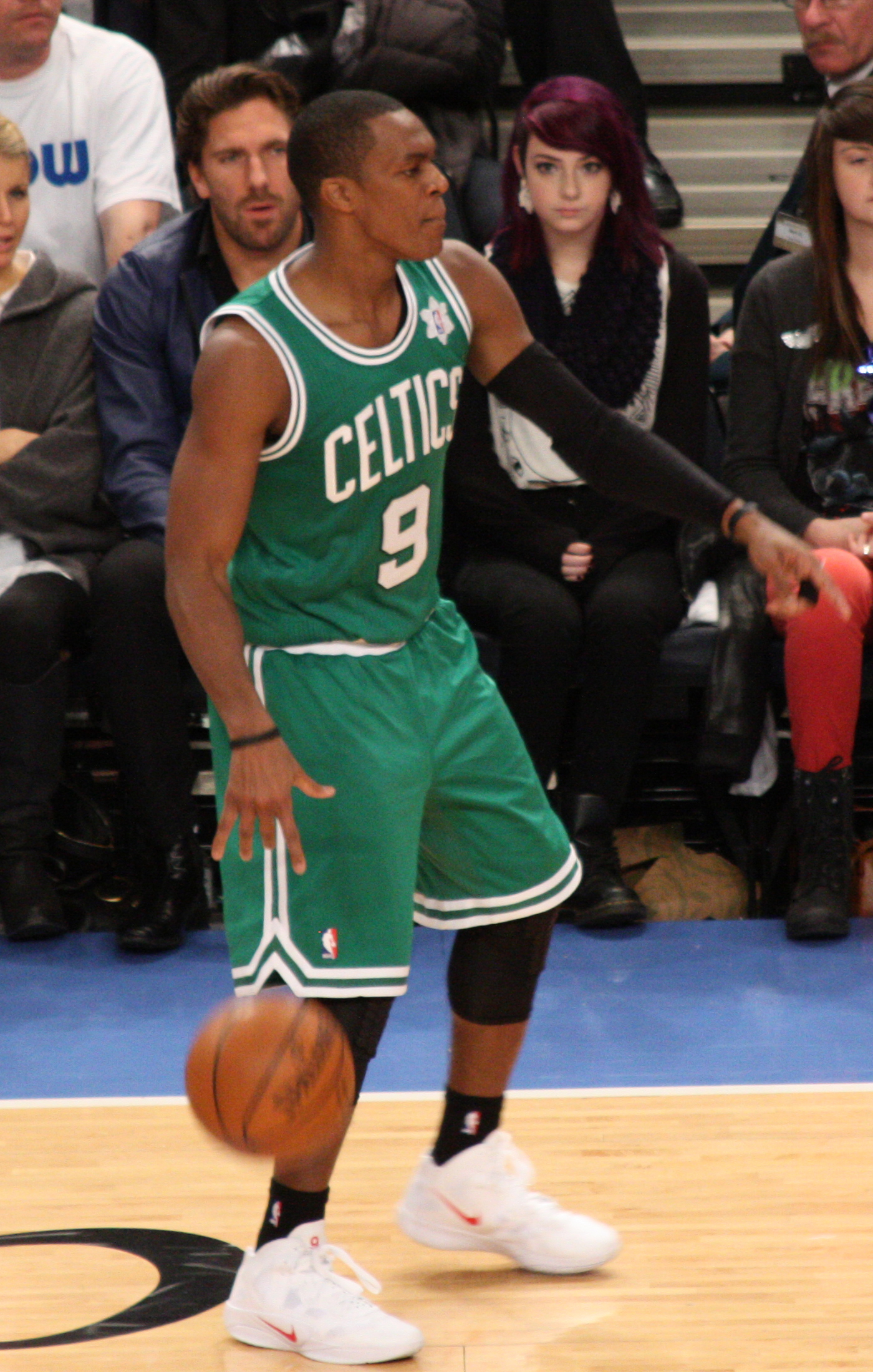 Rajon Rondo dribbling